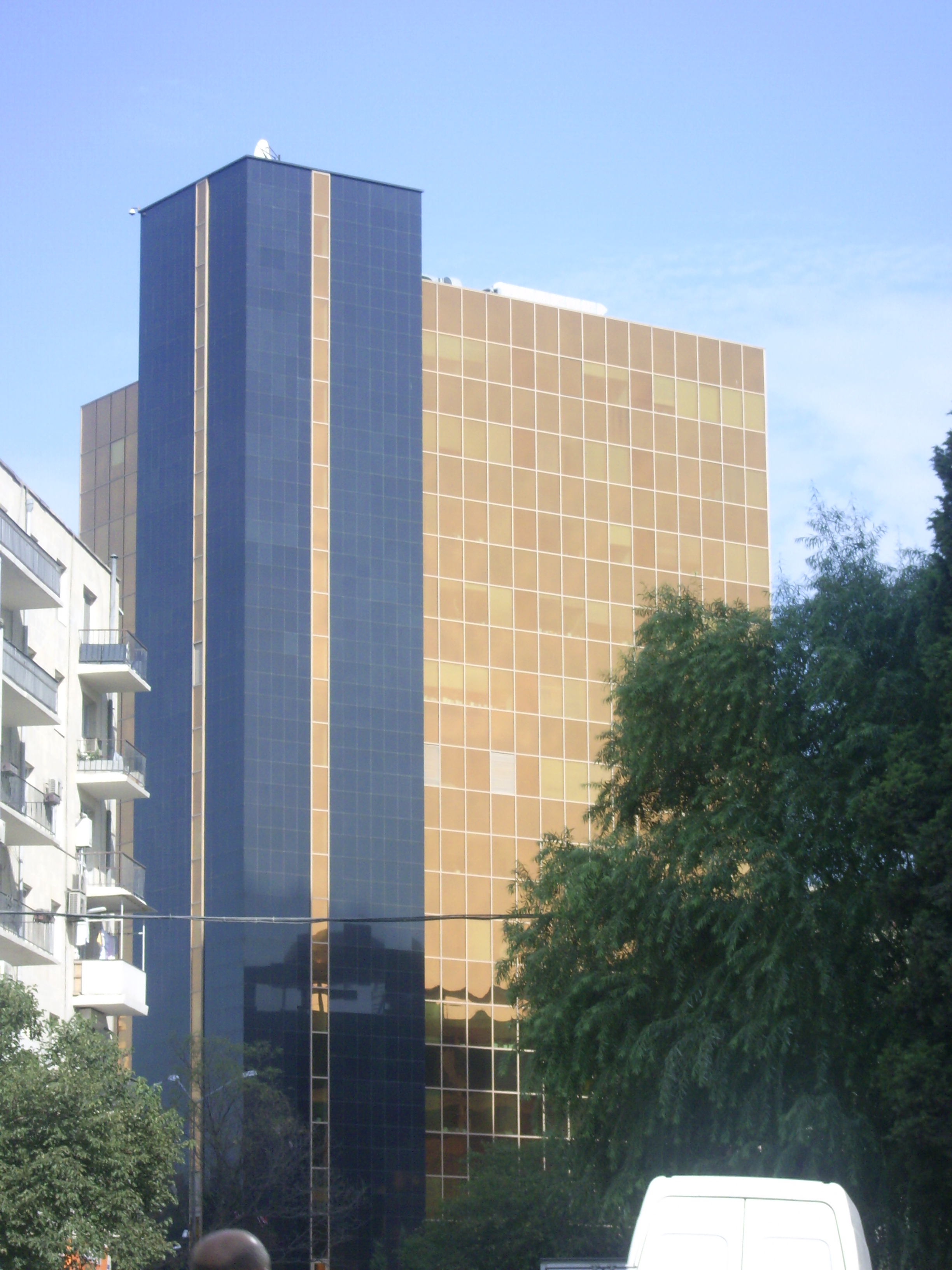 Центральный банк Азербайджанской Республики